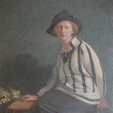 Lia Giovane